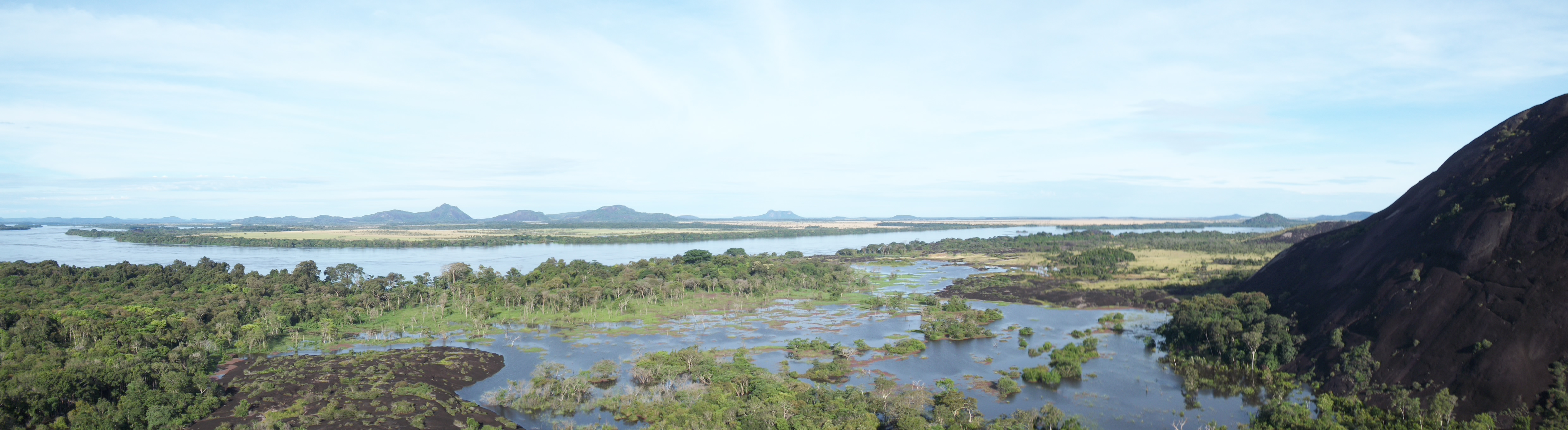 vista desde la cabeza de la tortuga en amazonas